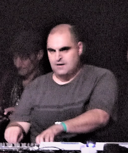 Anthony Pappa. A felvétel 2017. december 31-én, Szilveszter napján készült a Millenáris B épületében. 3D (Danny Howells, Dave Seaman, Darren Emerson) és Anthony Pappa DJ elektronikus zenéje